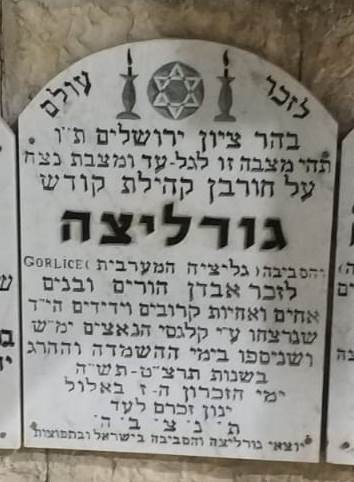 מצבת זיכרון לקהילת גורליצה במרתף השואה בהר ציון